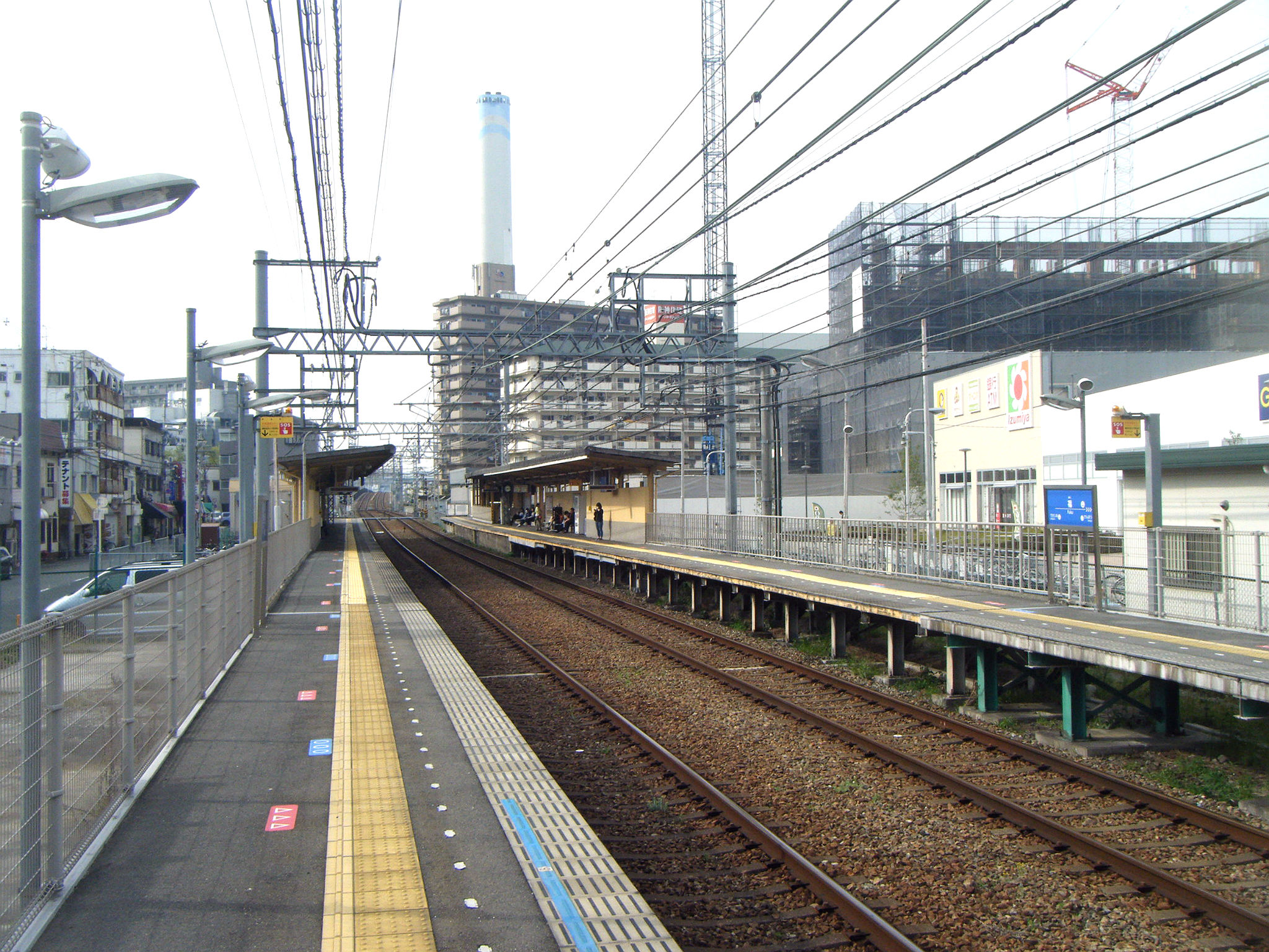 阪神なんば線 福駅 ホーム